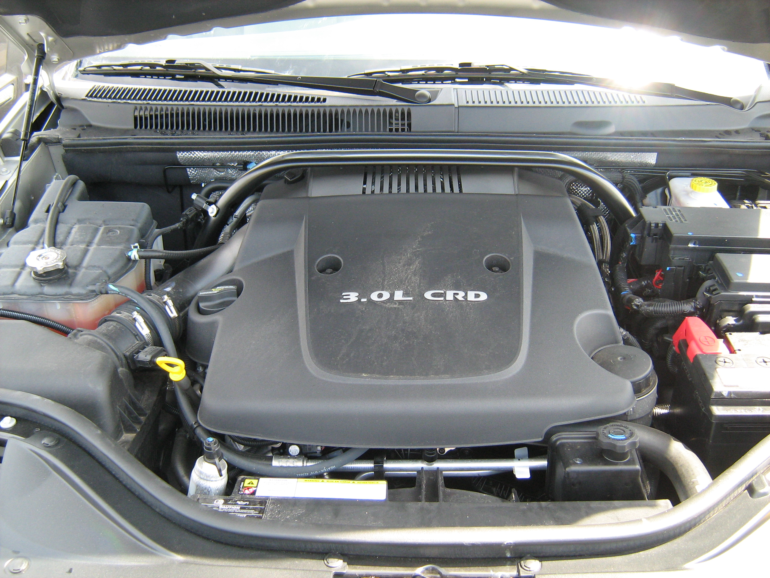 2008 Jeep Grand Cherokee 3.0 L Diesel engine